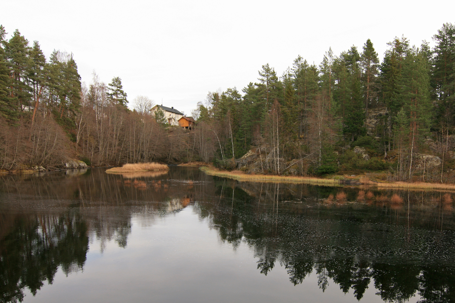 Klevfossdammen, Klevfoss industrimuseum, Løten.